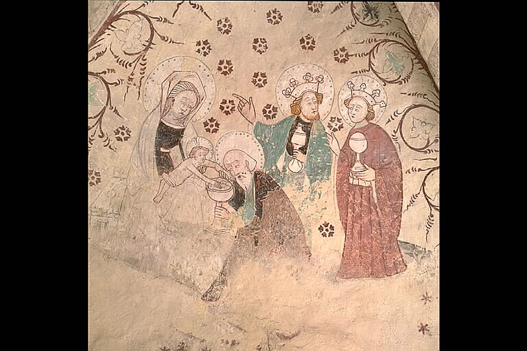 Vapenhusets valv. Konungarnas tillbedjan. Motiv: Ärentuna kyrka Kategori: (03) Kalkmålningar Vapenhusets valv. Konungarnas tillbedjan. Ärentuna kyrka.